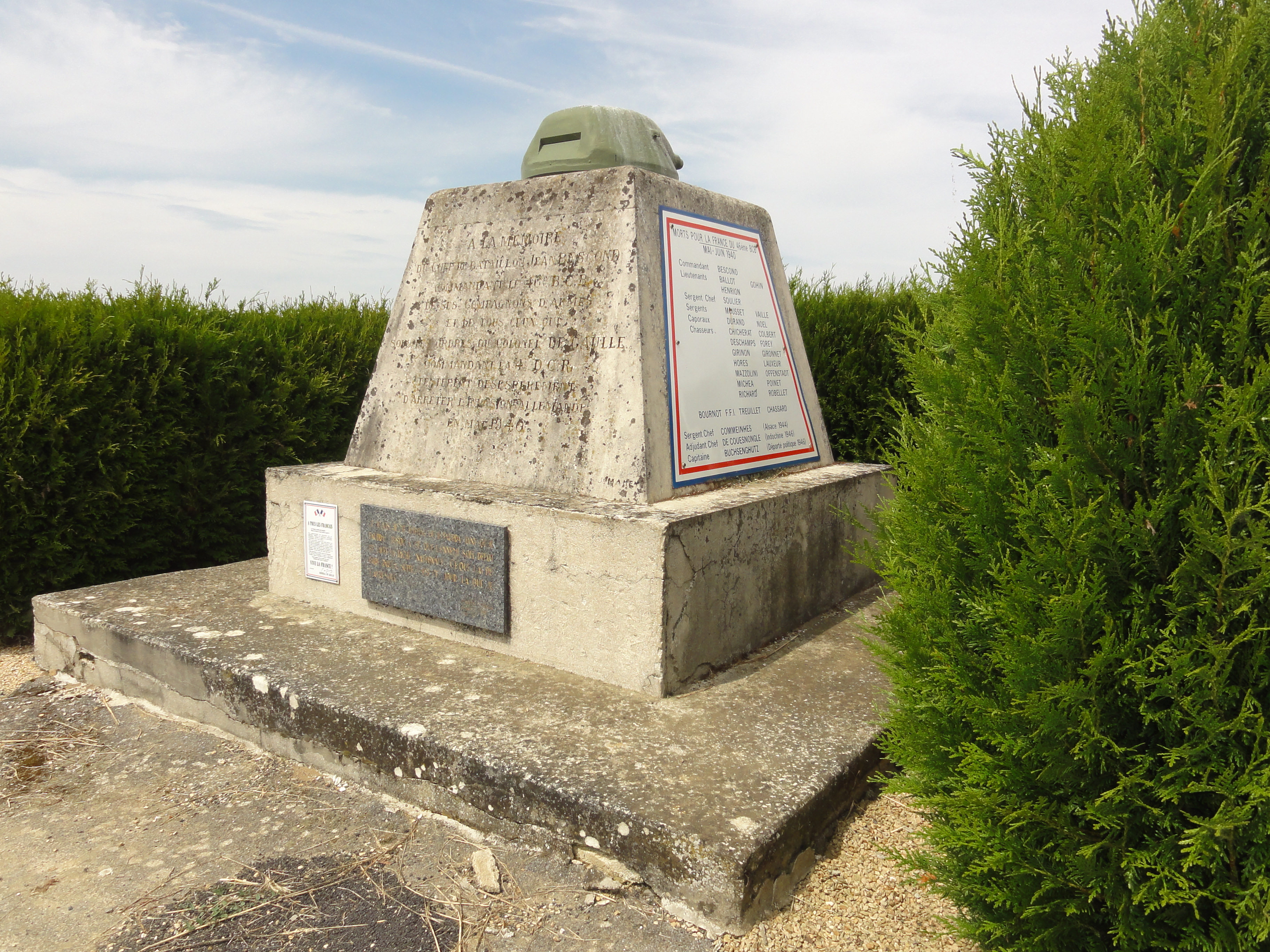 La Ville-aux-Bois-lès-Dizy (Aisne) mémorial char Sampiero-corso, commandant Bescond